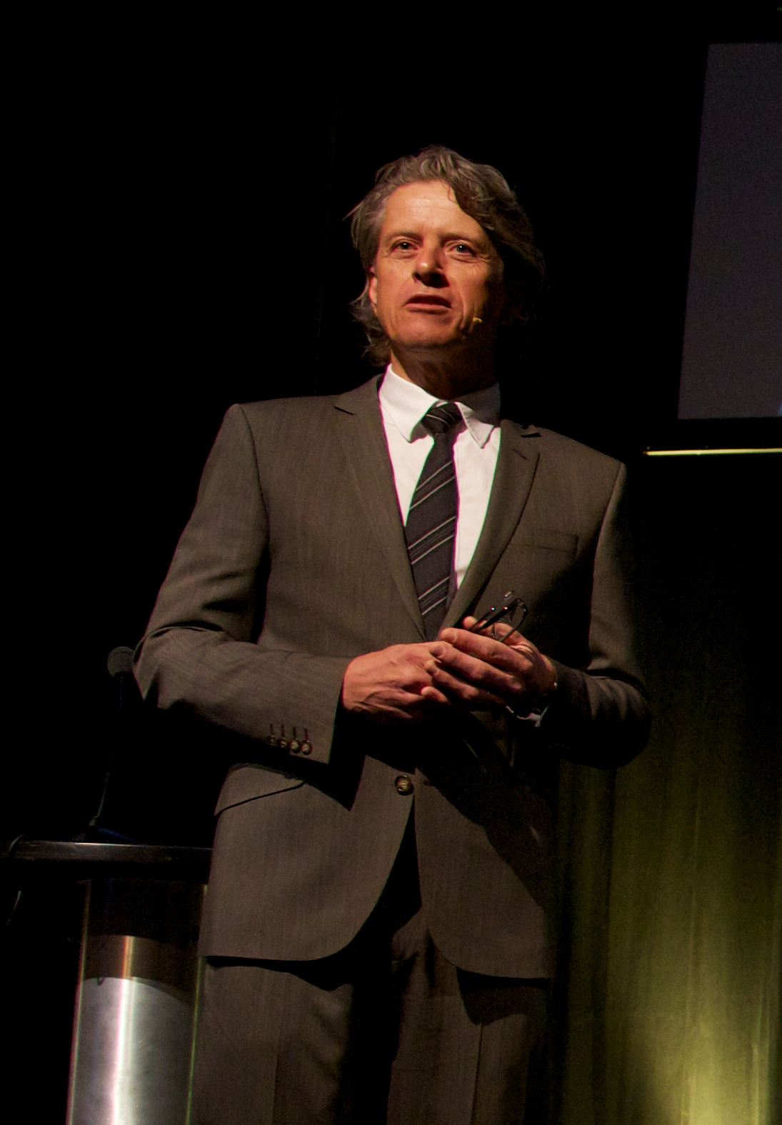 Knut Olsen